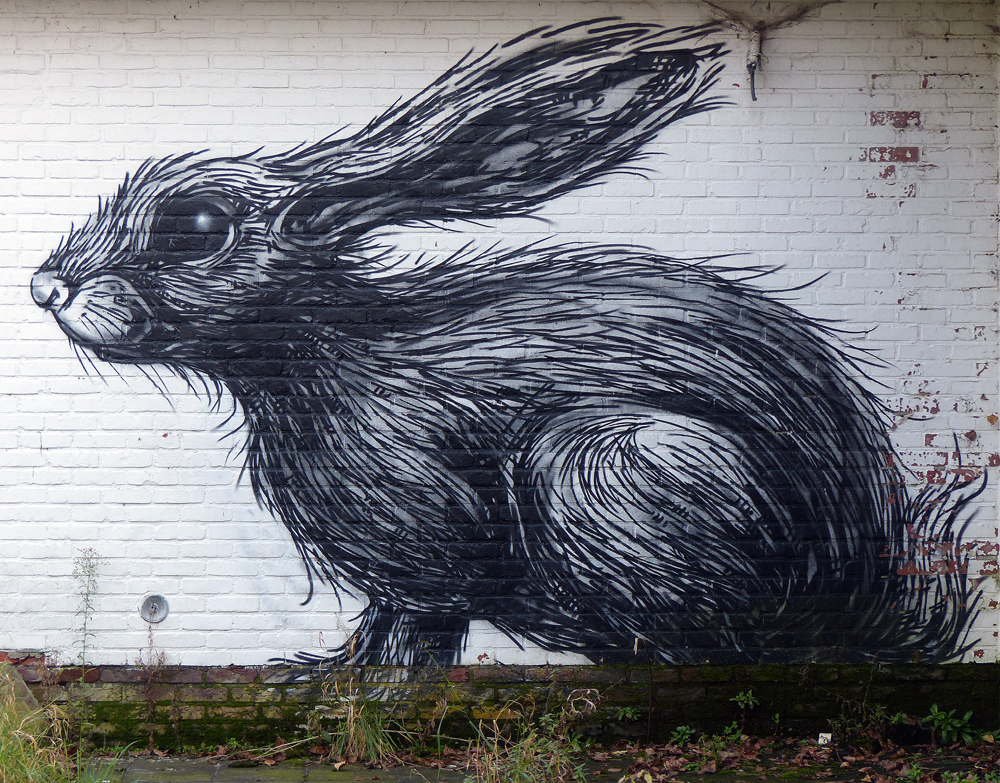 Hase von ROA (Künstler) in Doel (Nähe Antwerpen)